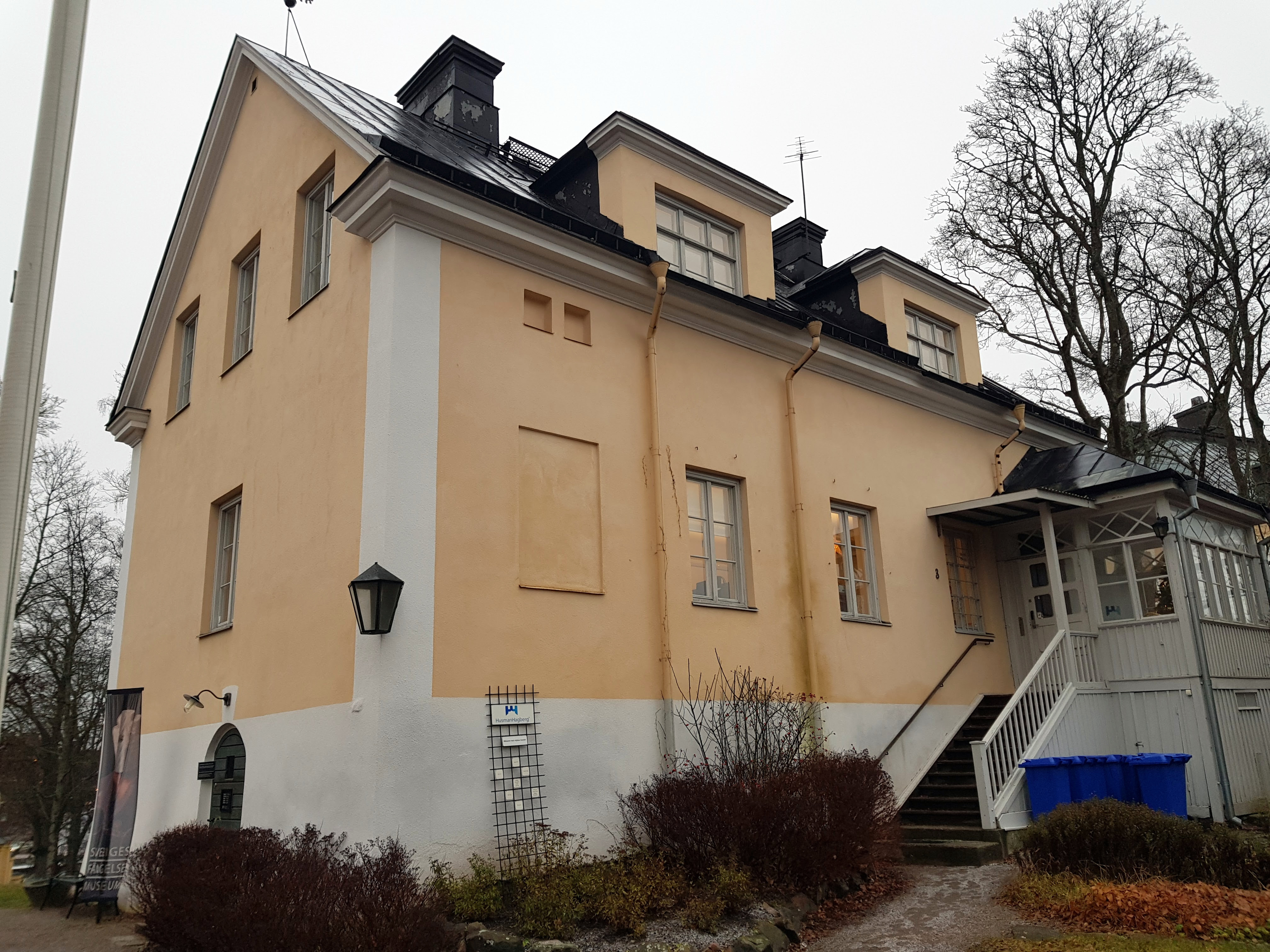 Gävle fängelsemuseum som ligger granne med gamla fängelset.